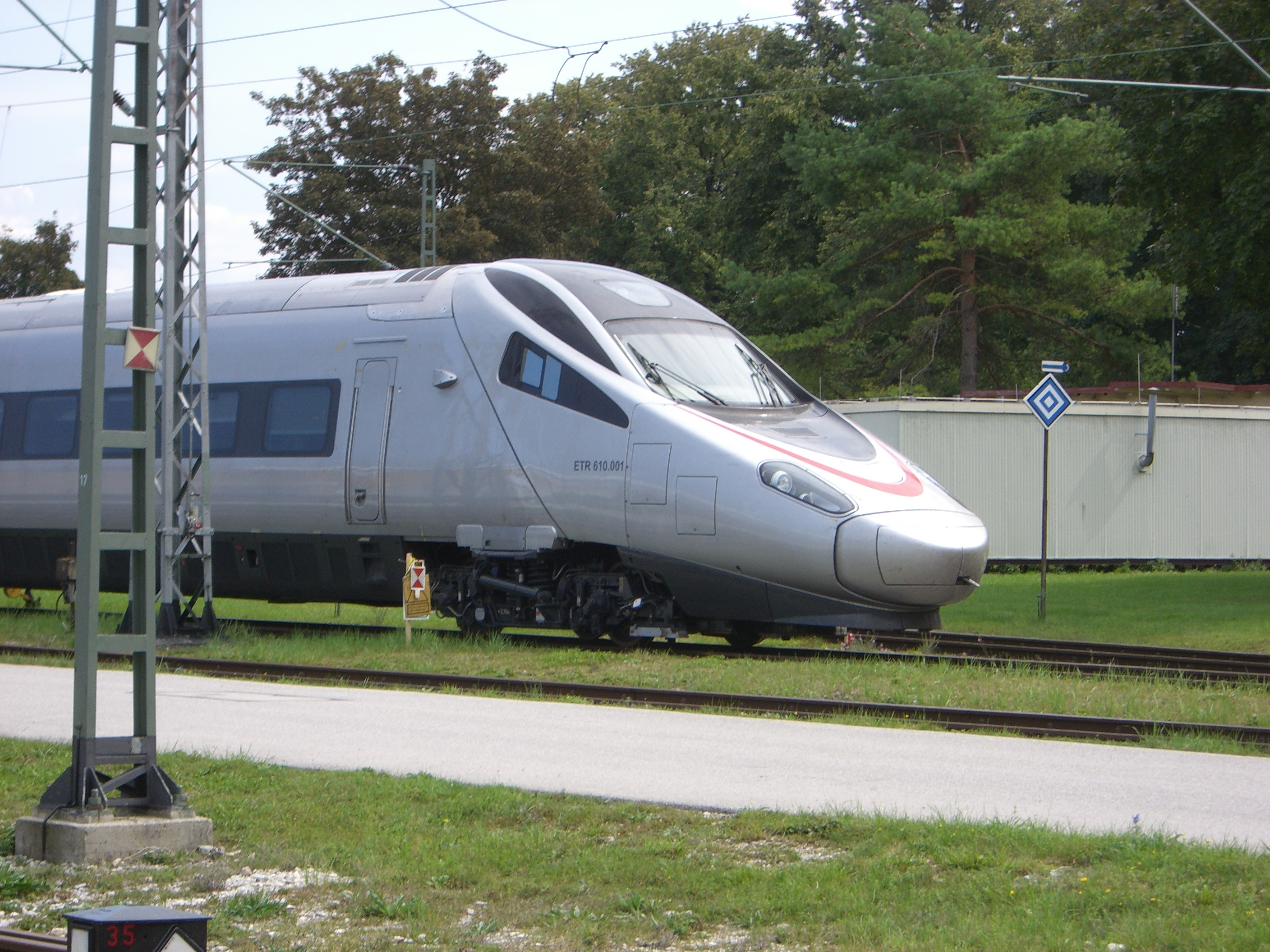 München - ETR 610 im DB-Ausbesserungswerk München-Freimann 1.jpg